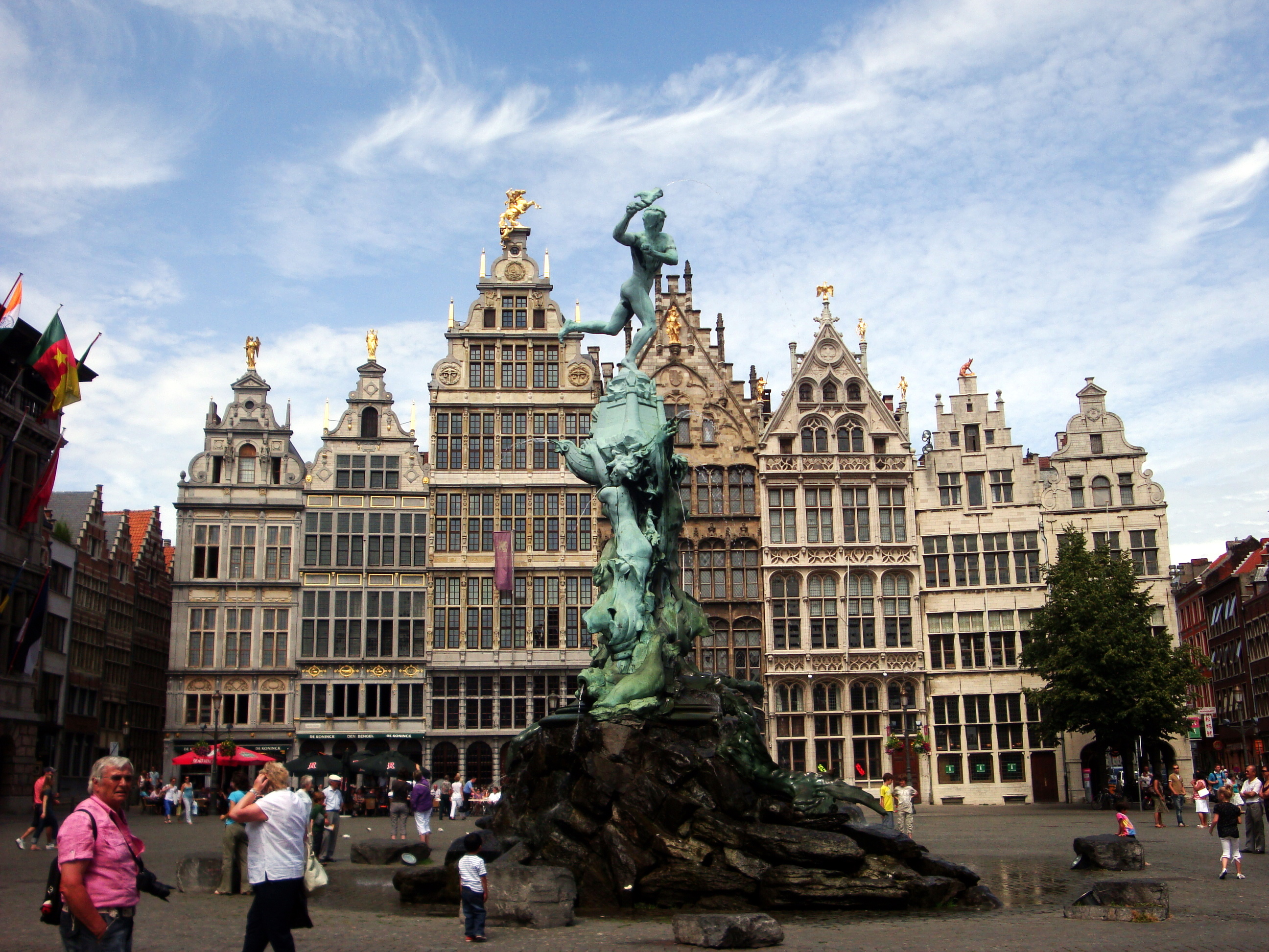 Grote Markt, Antwerpen, Belgium